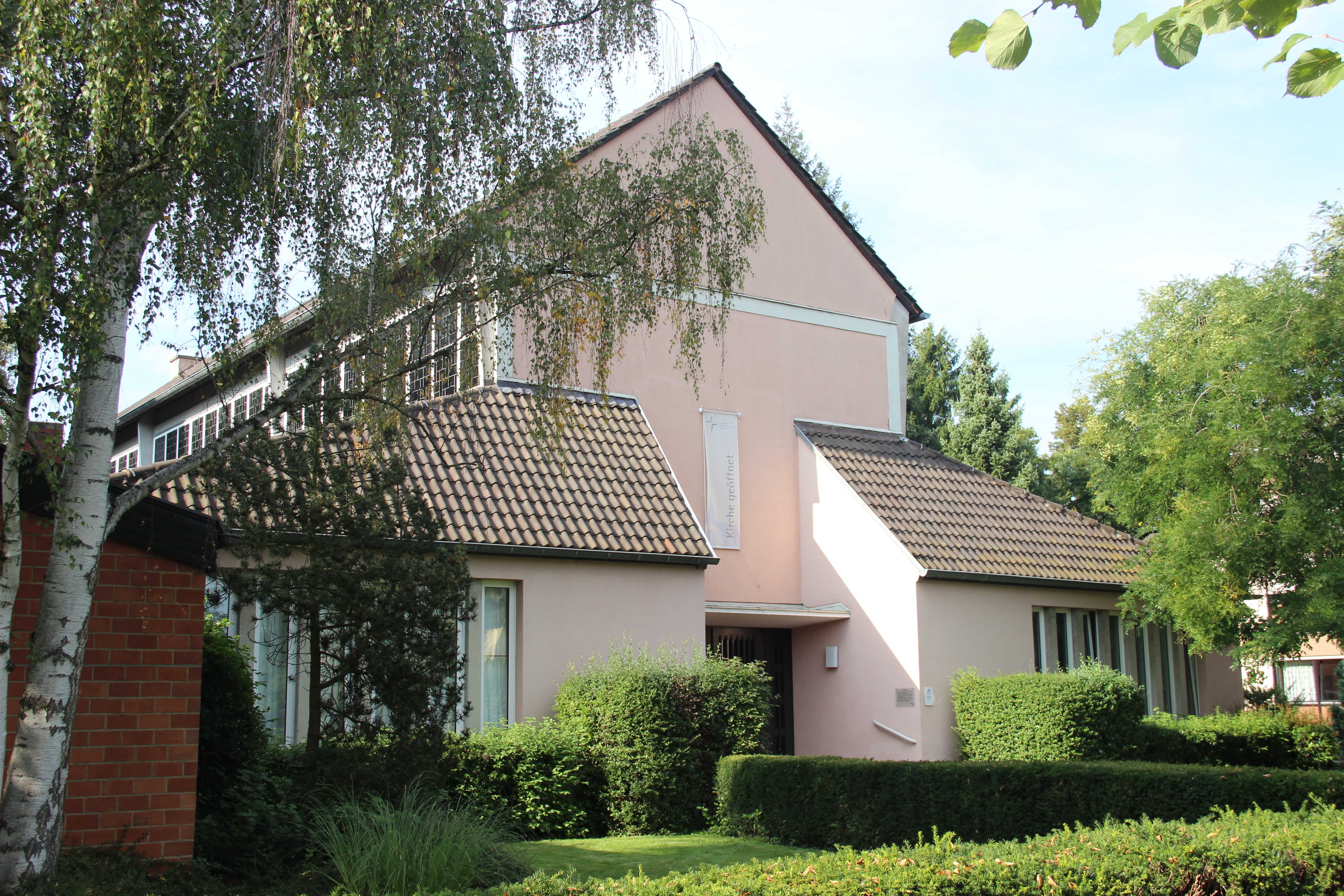 Christuskirche Bad Godesberg, Wurzerstraße 31, Bonn-Plittersdorf: Außenansicht